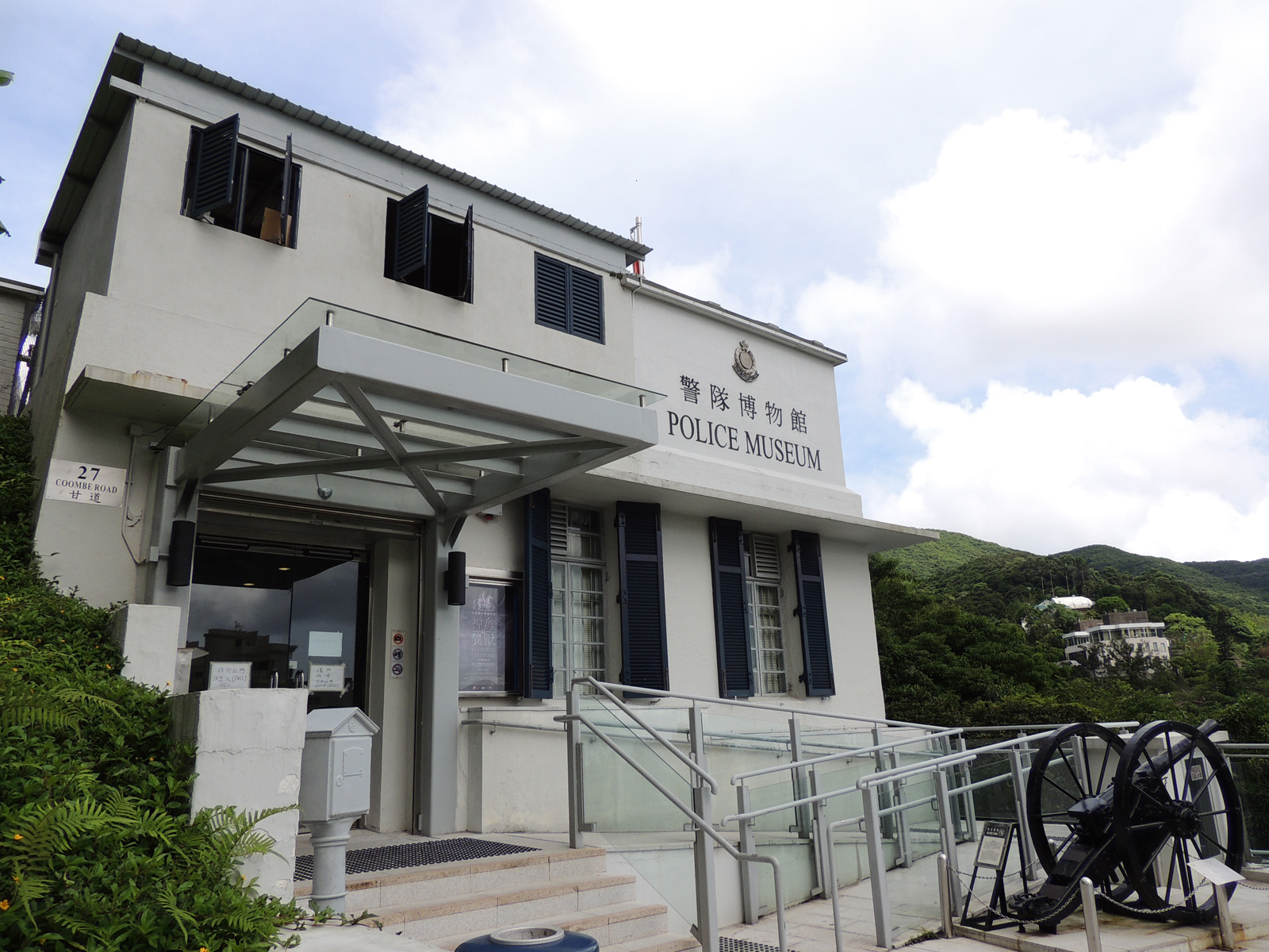 Hong Kong Police Museum